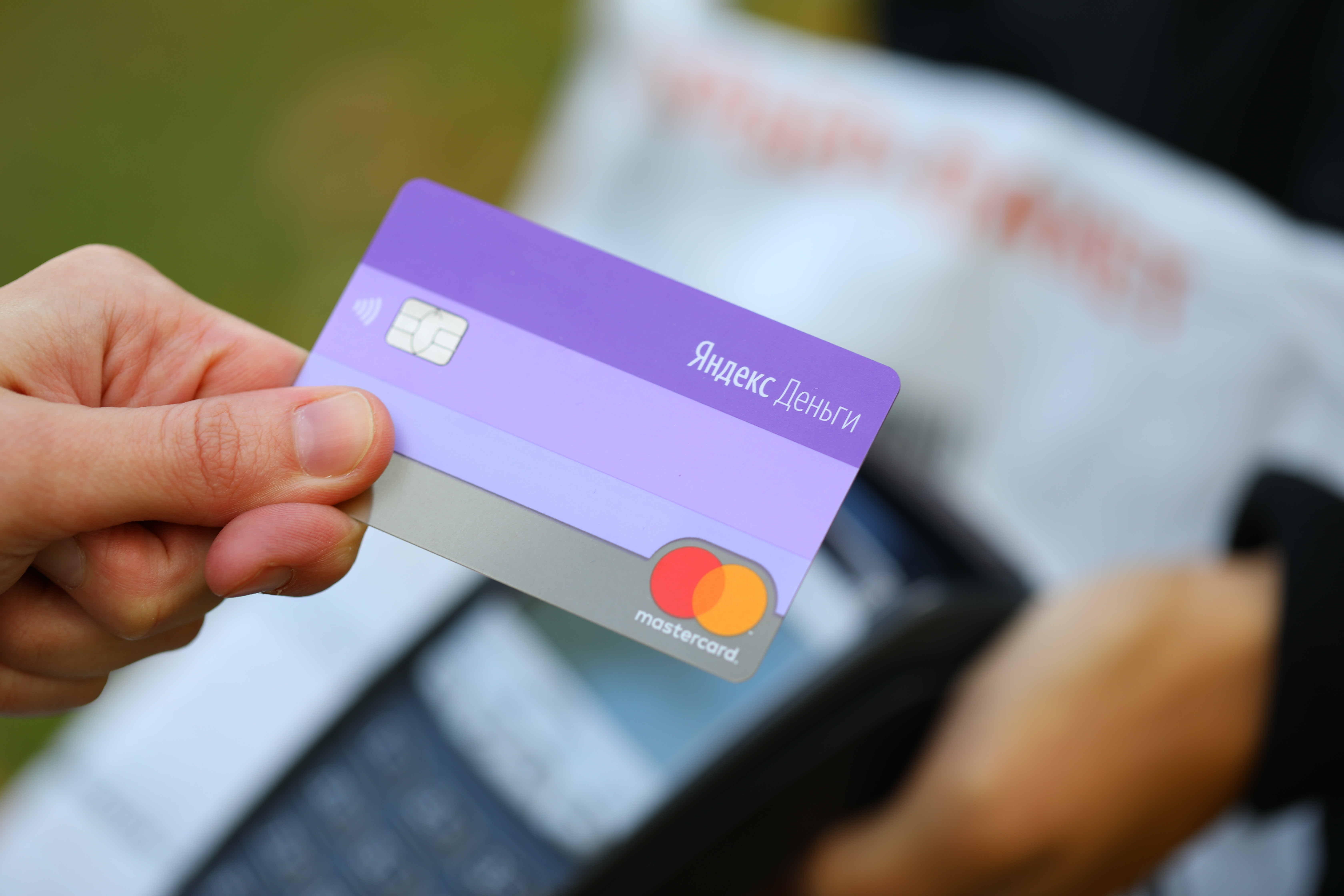 Фиолетовая дебетовая карта «Яндекс.Денег»